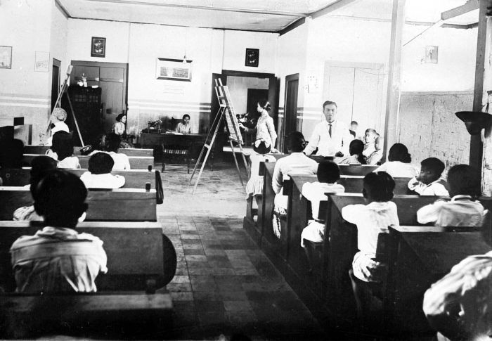 Repronegatief. Een klas van het Nationaal Onderwijs Instituut "Taman Siswa" te Bandung, Java, met mevrouw Soerjoadipoetro achter het bureau in gezelschap van een onderwijs-typiste